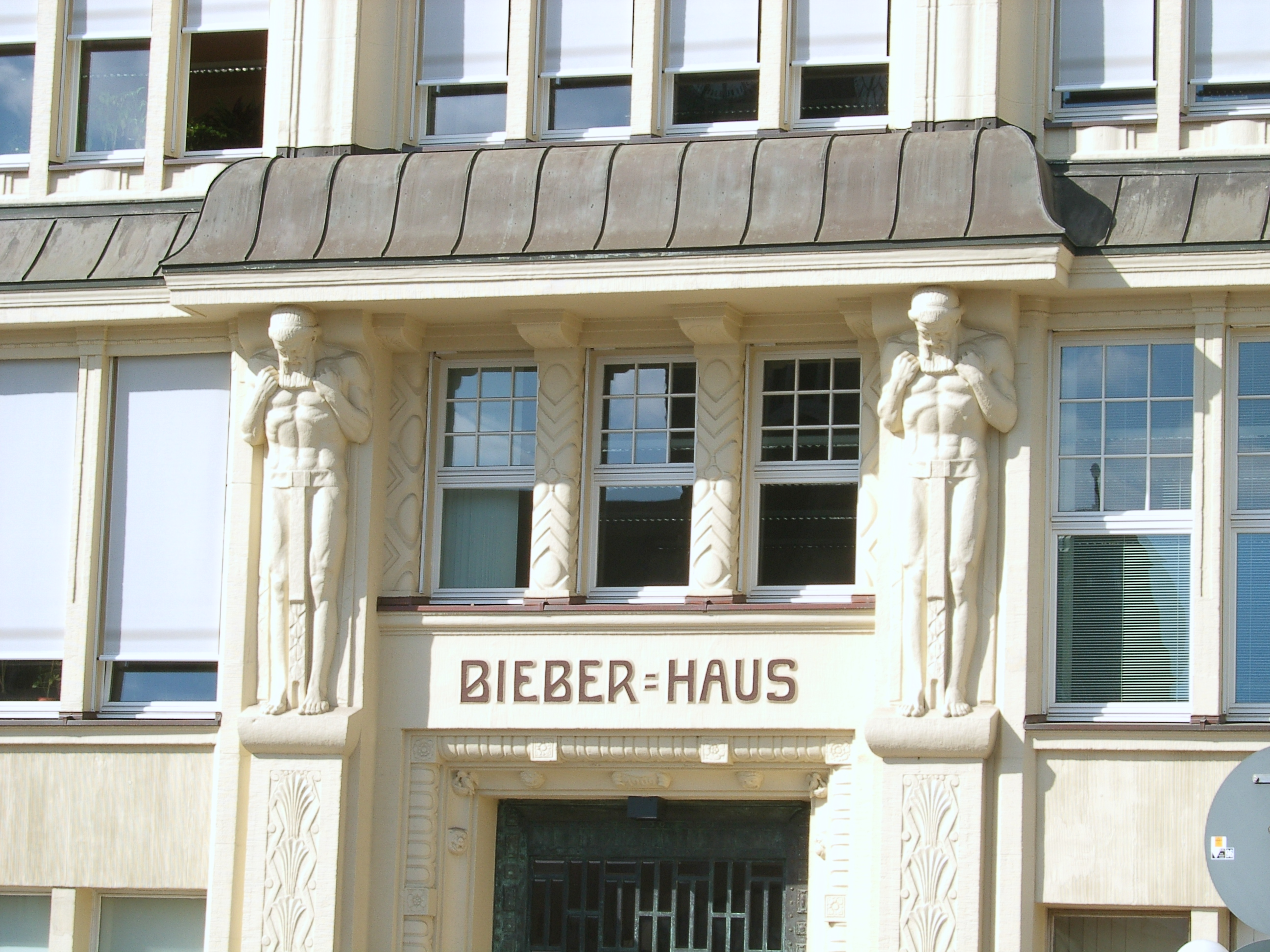 Eingang des Bieberhauses am Hachmannplatz in St. Georg. Das Haus wurde als Stahlbetonskelettbau 1908 bis 1910 von Rambatz & Jollasse gebaut. This is a photograph of an architectural monument.